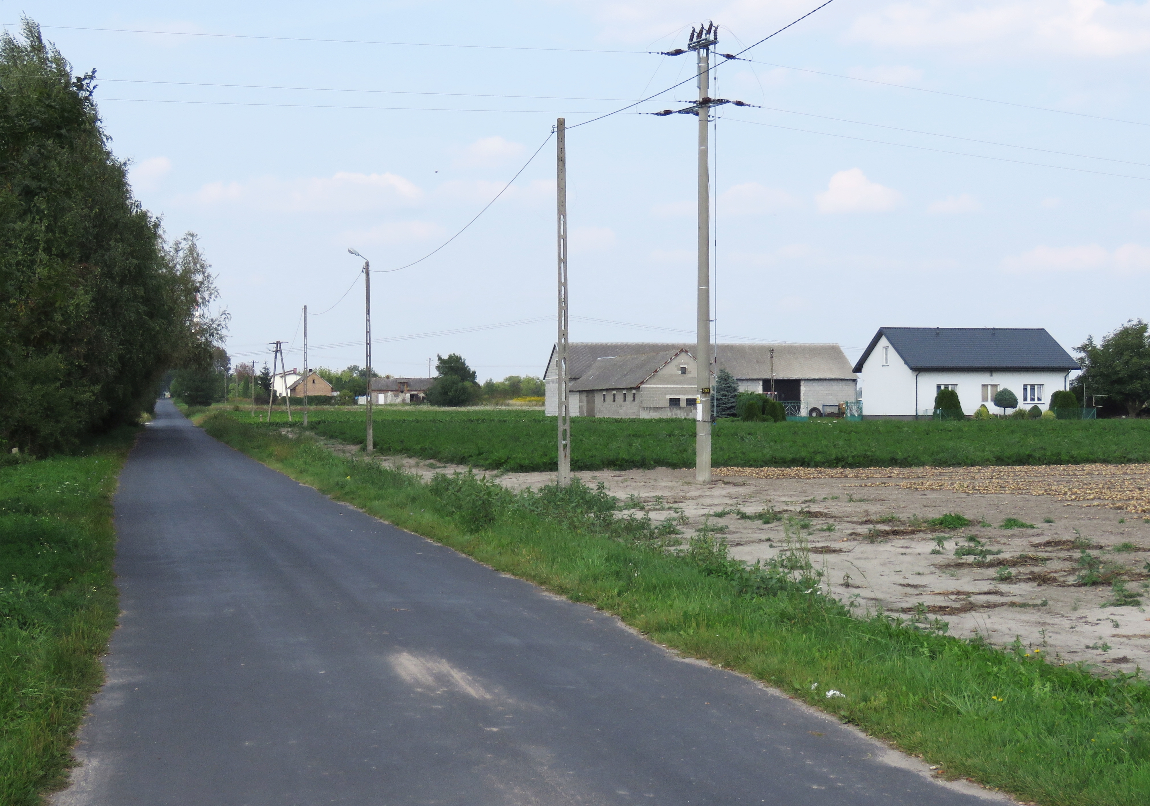 Gawartowa Wola gm.Leszno